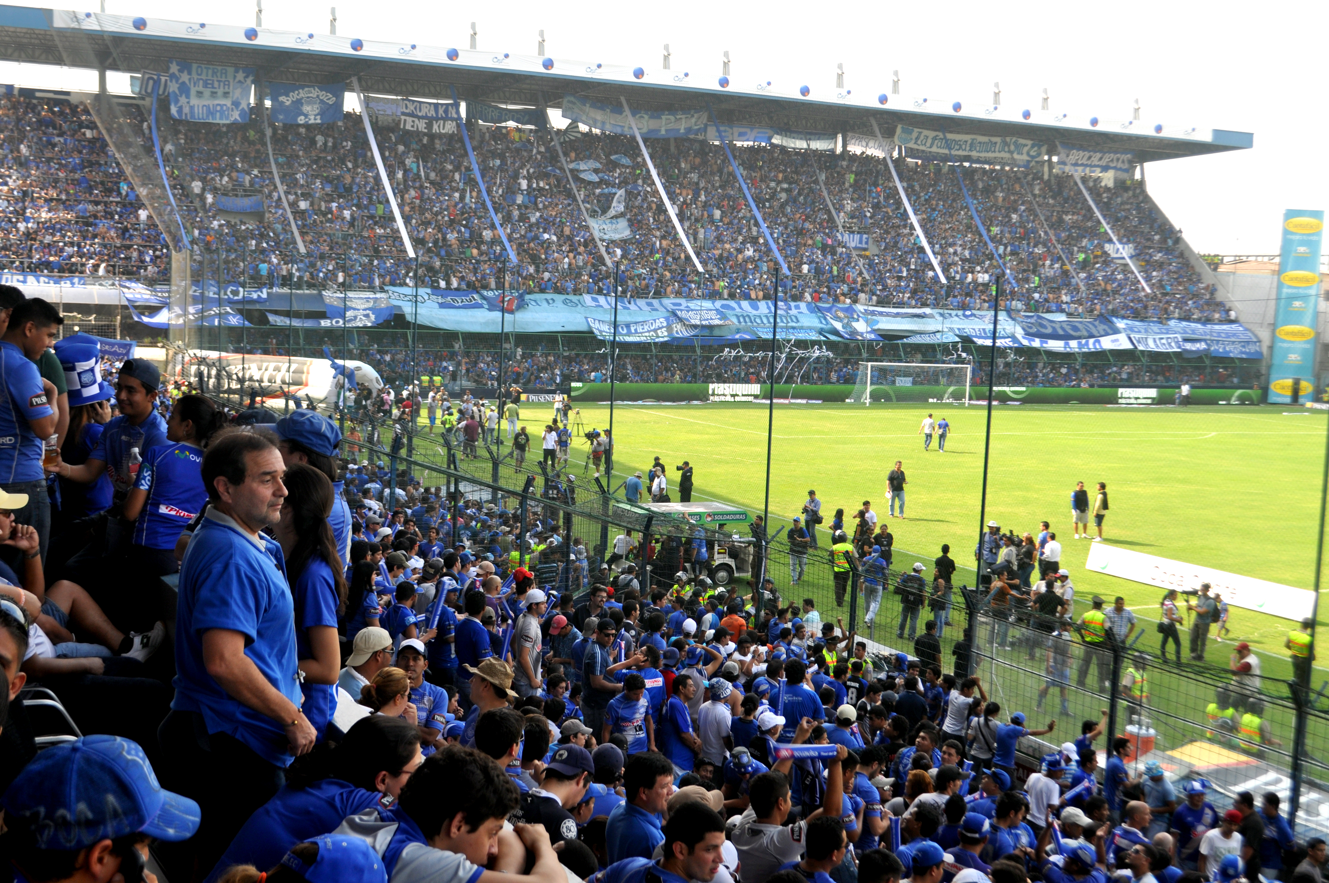 Estadio George Capwell durante un partido de fútbol, donde se aprecia la hinchada del Club Sport Emelec.